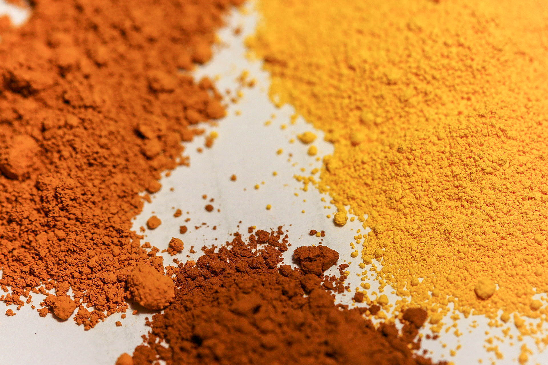 Gelbpigmente: Eisenoxidgelb, Siena und Cadmiumgelb- Pigmente, von links nach rechts